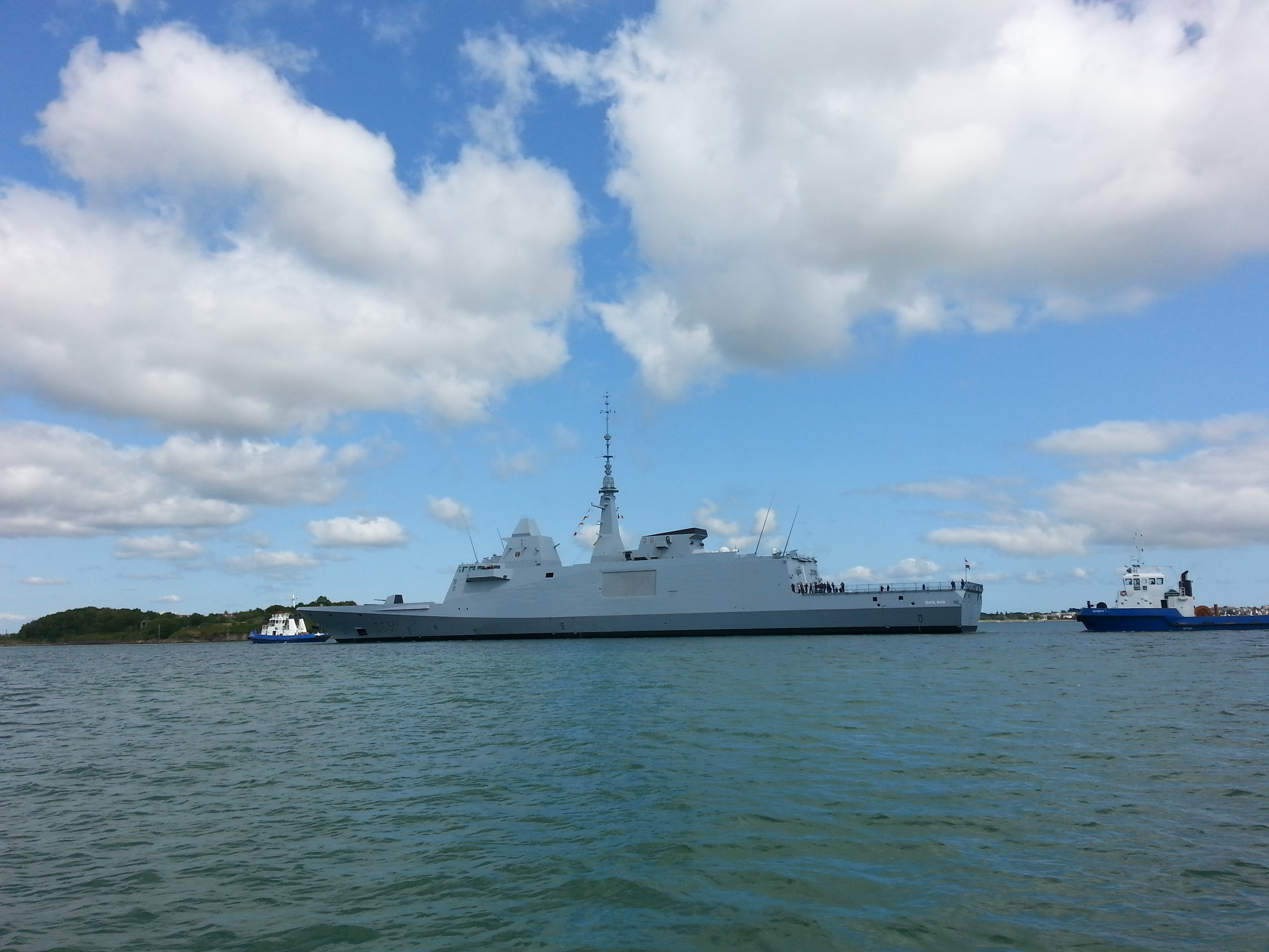 La frégate FREMM Tahya Misr rentre à Lorient après des essais en mer.